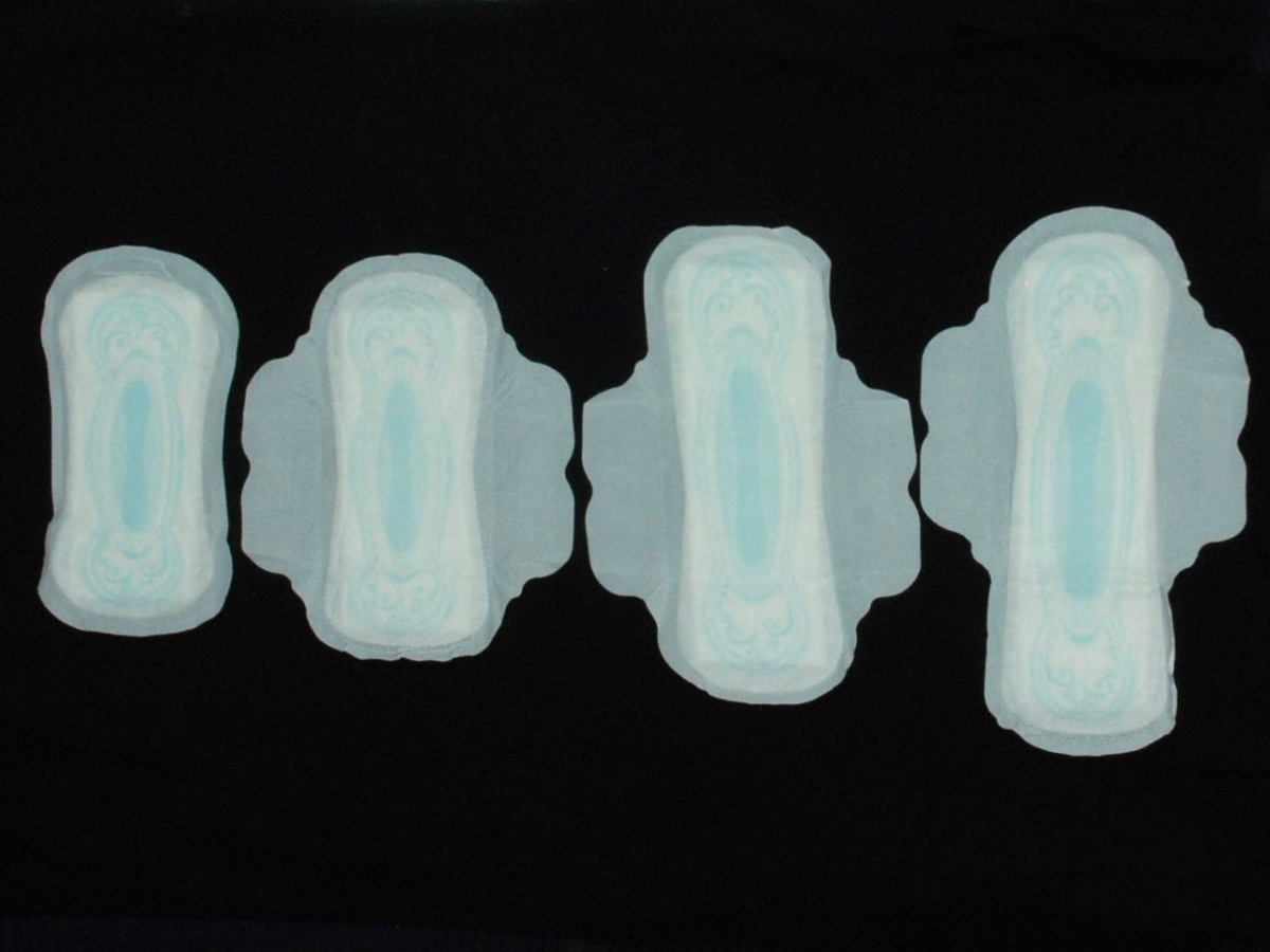 Hygienické vložky Hygienické vložky - různé velikosti